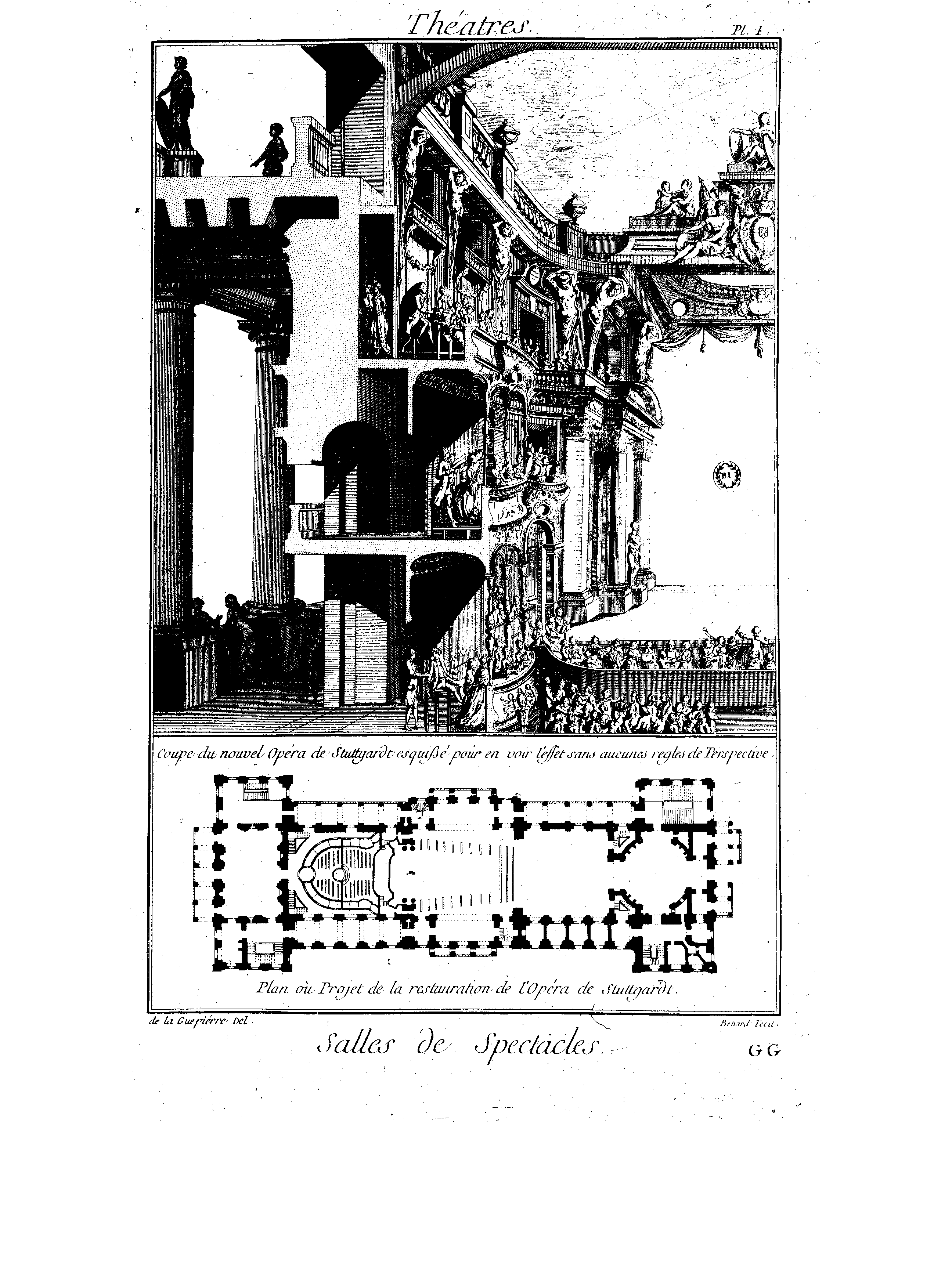 Planches de l'Encyclopédie de Diderot et d'Alembert, volume 9